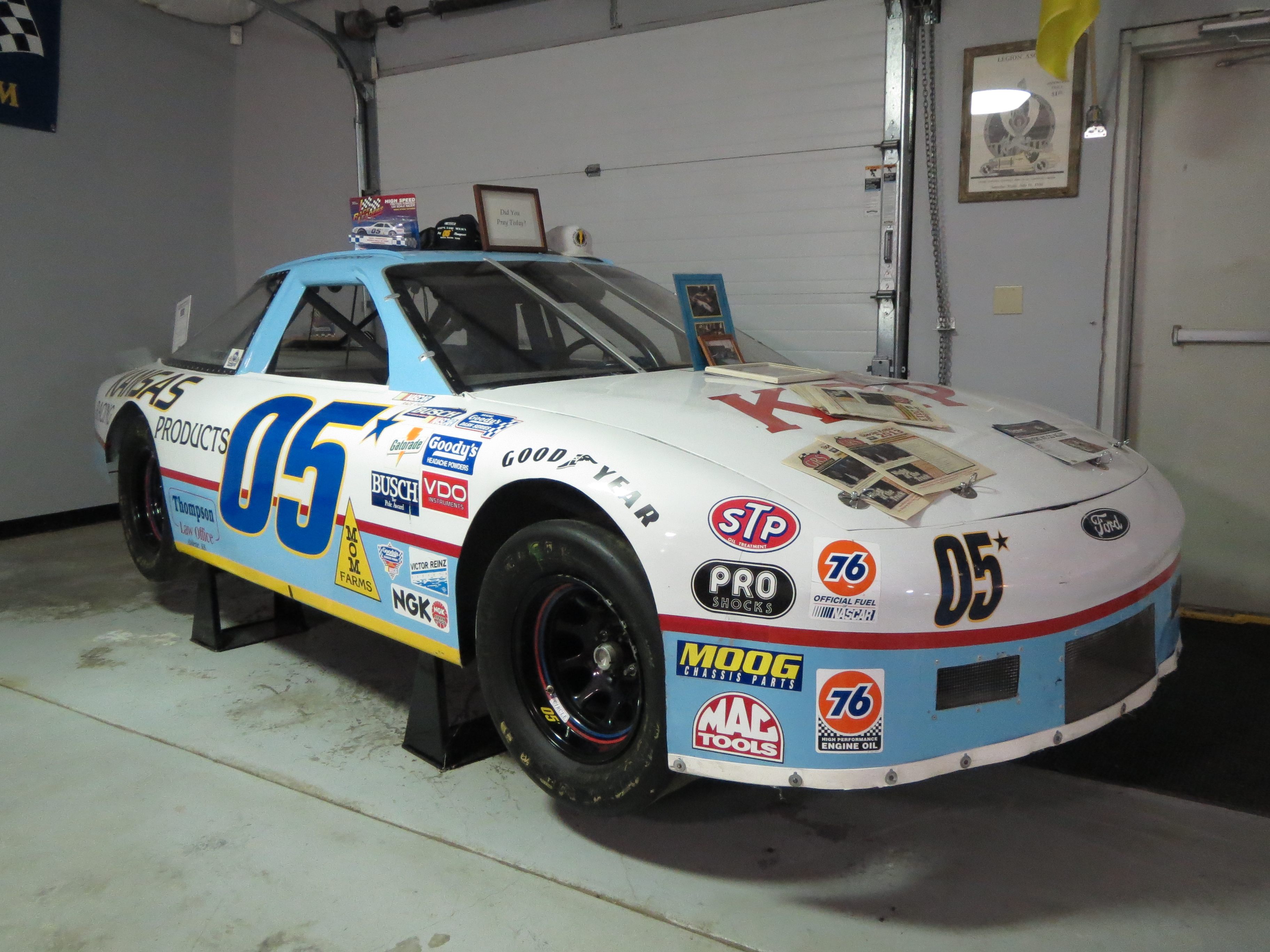 Kansas Auto Racing Museum